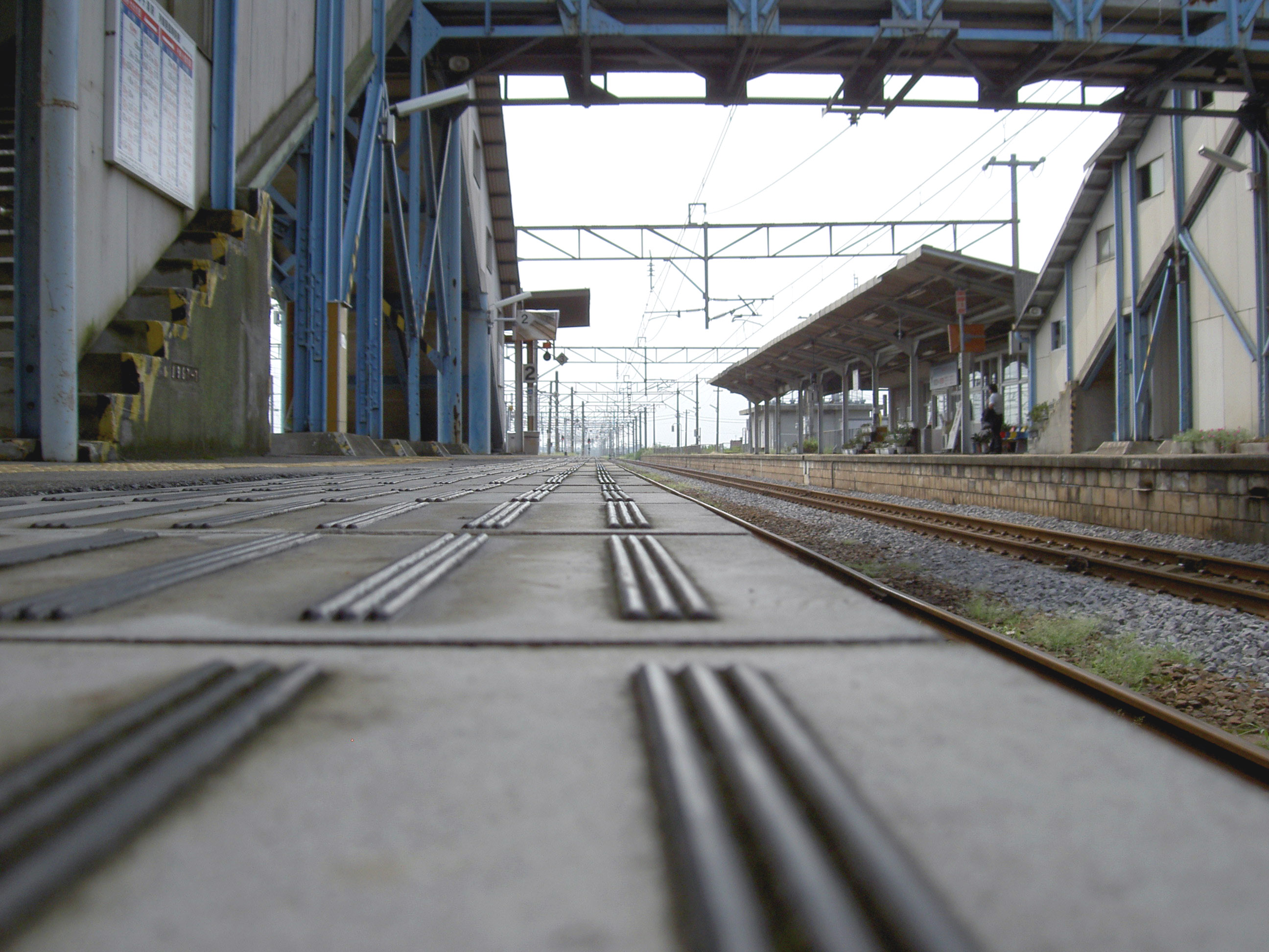 柳ヶ浦駅構内